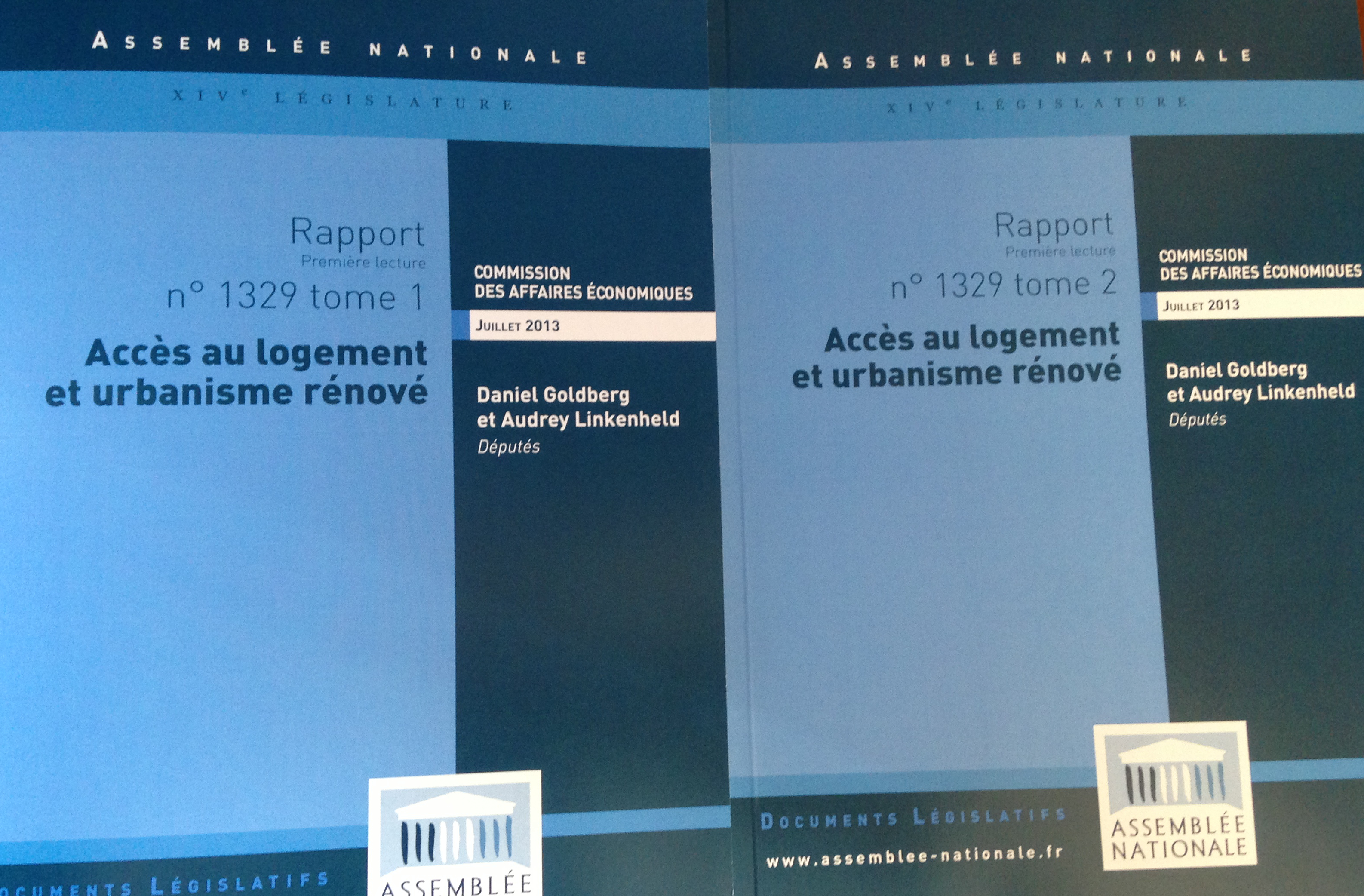 Couverture des deux tomes du rapport de la commission des affaires économiques de l'Assemblée national projet de loi pour l’accès au logement et un urbanisme rénové (ALUR) par les députés Daniel Goldberg et Audrey Linkenheld (été 2013).